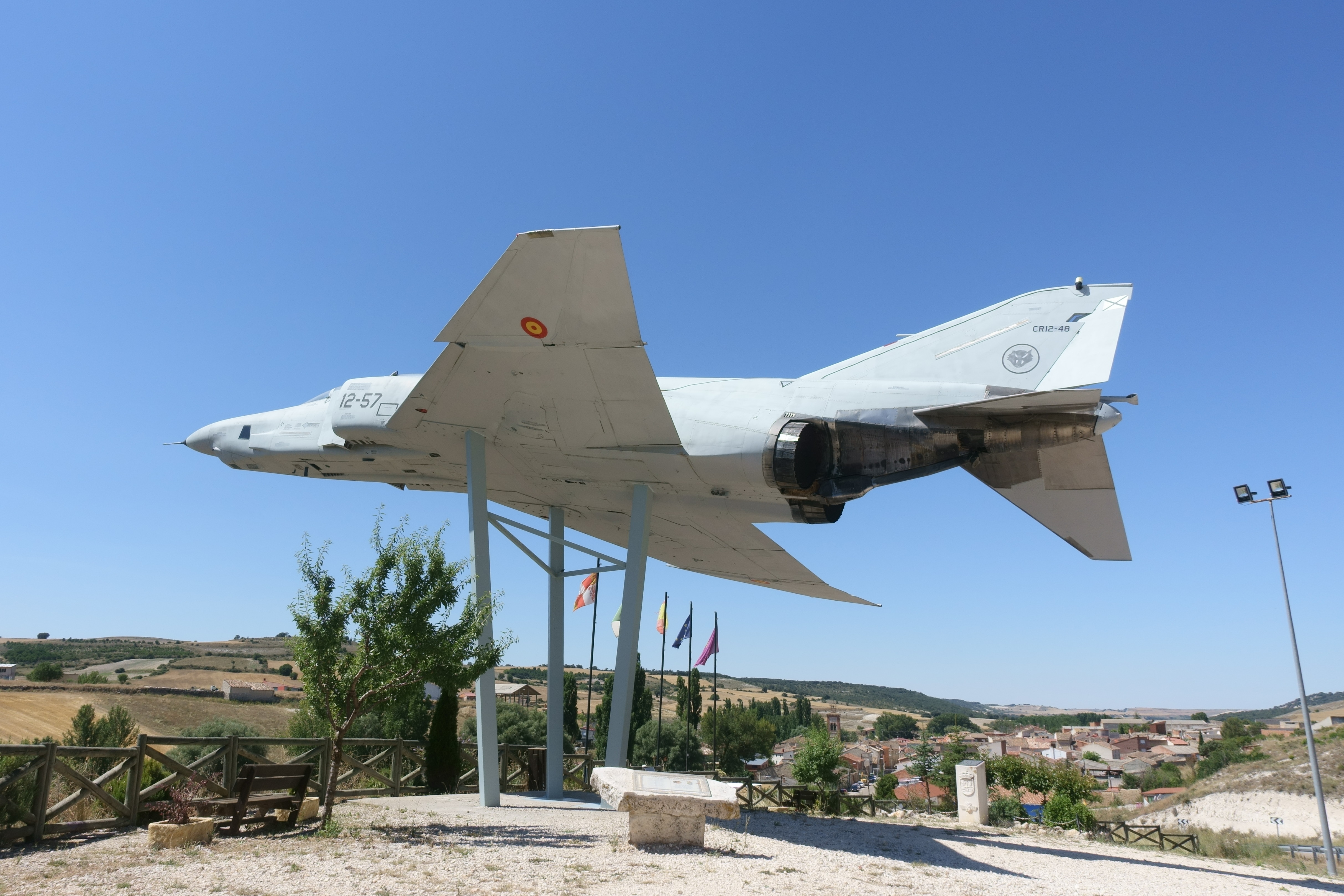 Avión de combate F4 Phantom II en Antigüedad (Palencia, España).